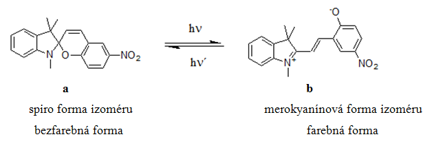 Fotoizomerizácia spiropyránu